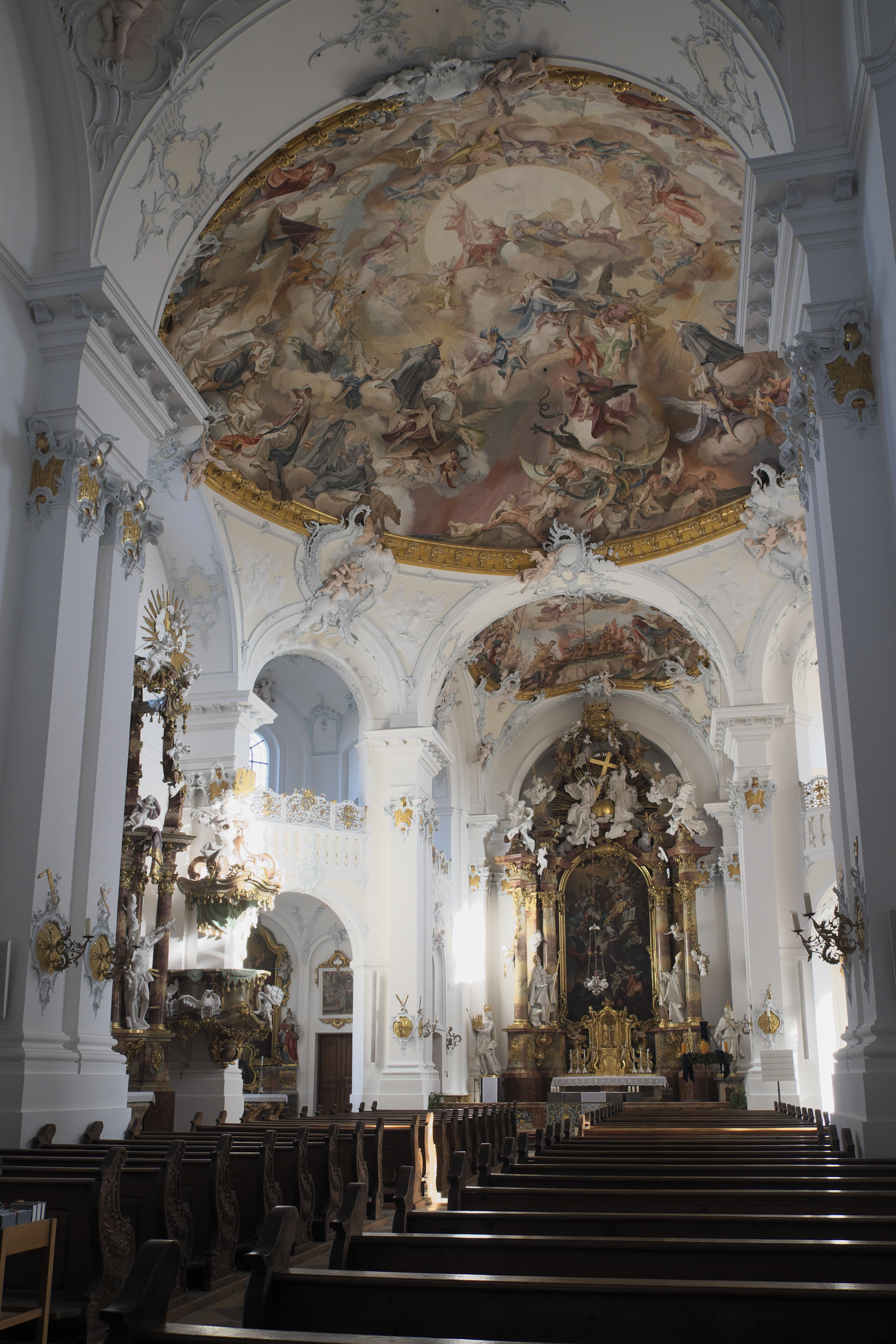 Katholische Pfarrkirche St. Marinus und Anianus, ehemalige Abteikirche des Benediktinerklosters Rott in Rott am Inn im Landkreis Rosenheim (Bayern/Deutschland), Innenraum